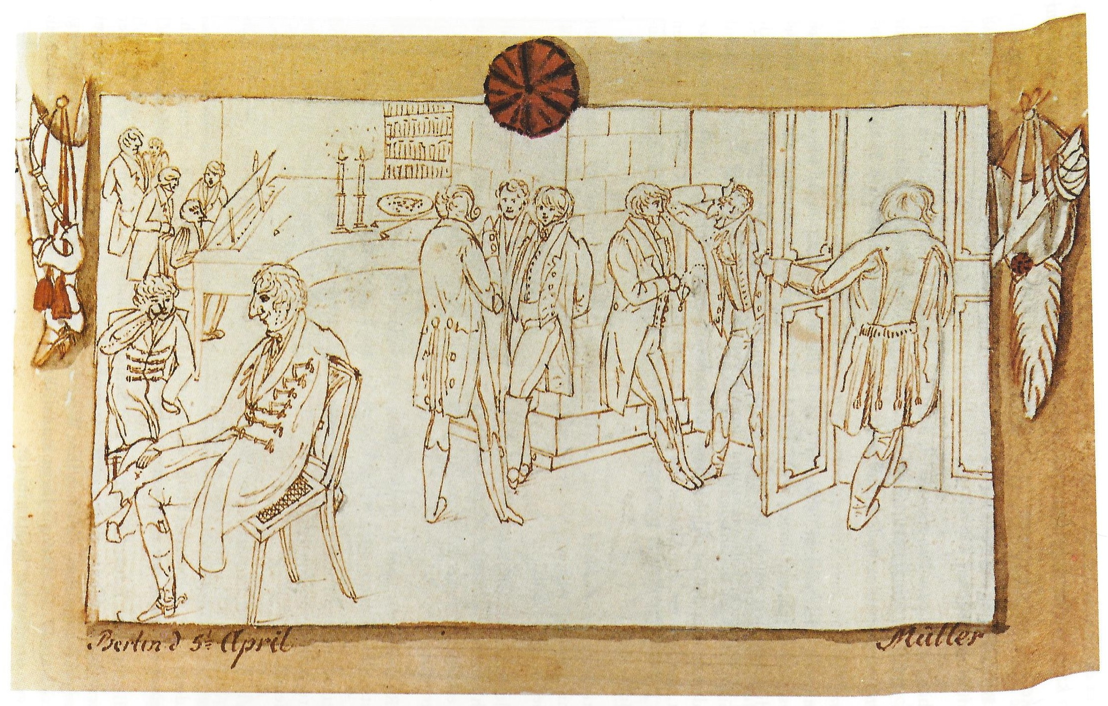 Abiturientenfeier des Grauen Klosters am 5. April 1810 im Hause des Staatsministers Friedrich Leopold von Schrötter. Kolorierte Federzeichnung aus dem Stammbuch Klaatsch, 11x18,5 cm.